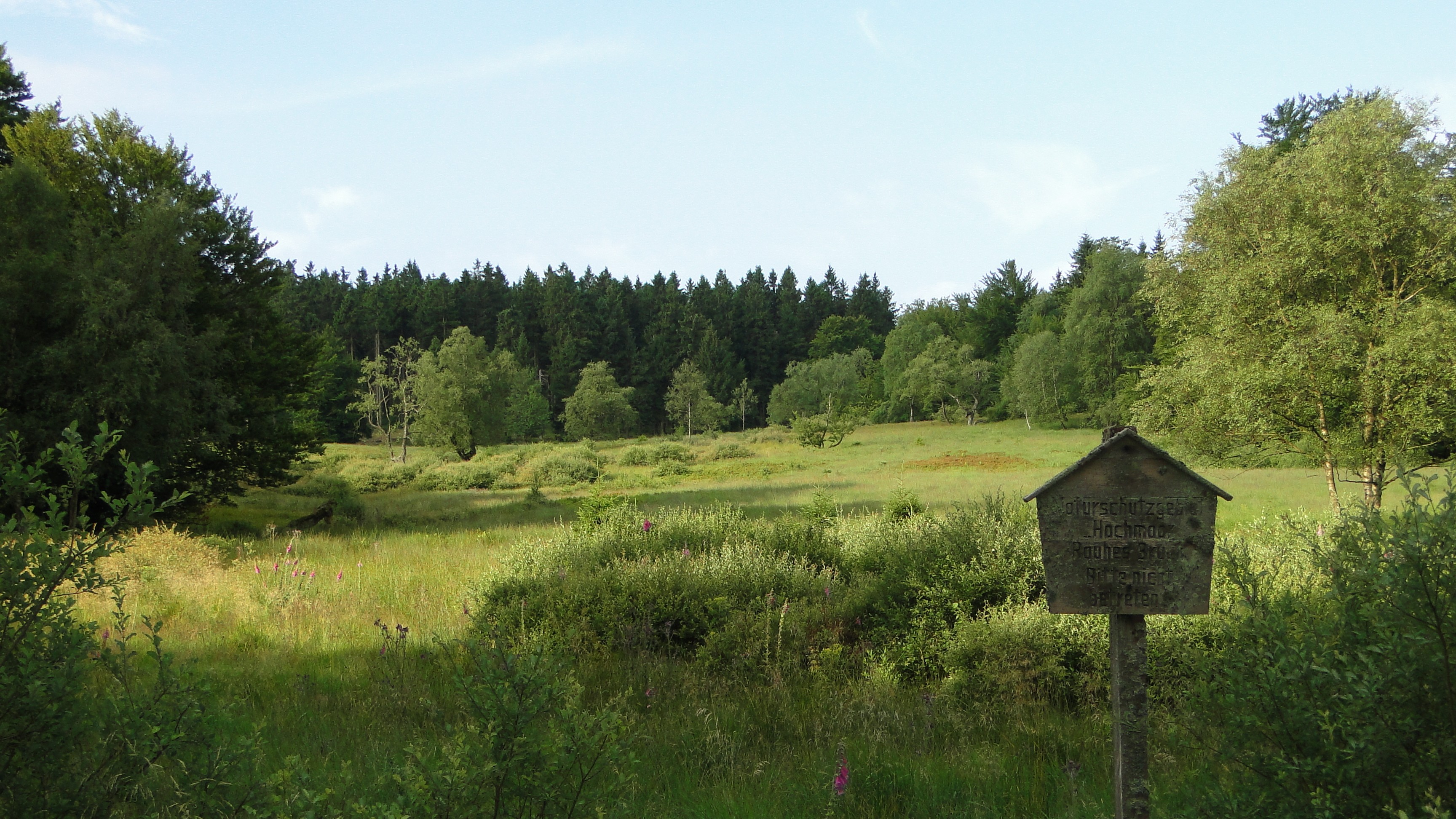 Altes Holzschild am Moorbereich „Rauhes Bruch“ (ein ehemals separates, 1953 ausgewiesenes Naturschutzgebiet), Teil des Naturschutzgebiets „Hunau–Langer Rücken–Heidberg“ (NSG HSK-015) an der Hunau in Schmallenberg